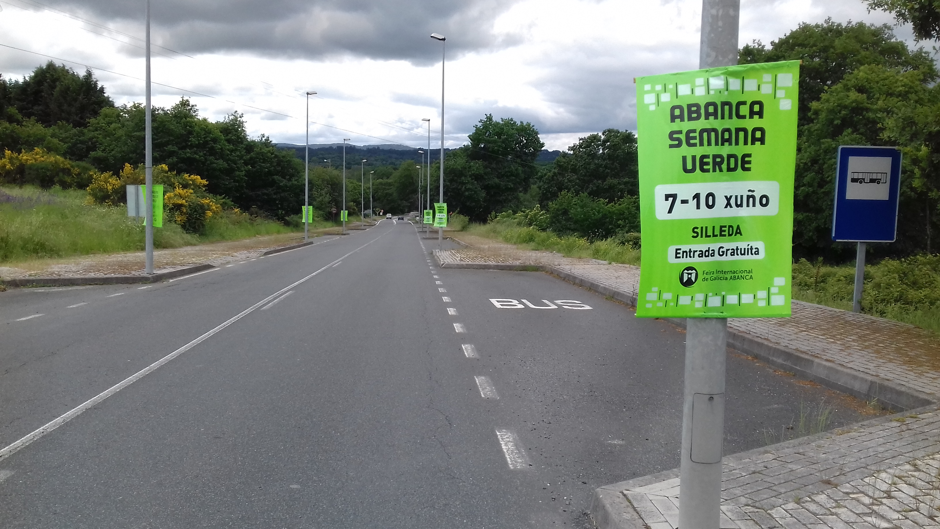 Estrada LU-221 ao seu paso por Esporiz (Monterroso)